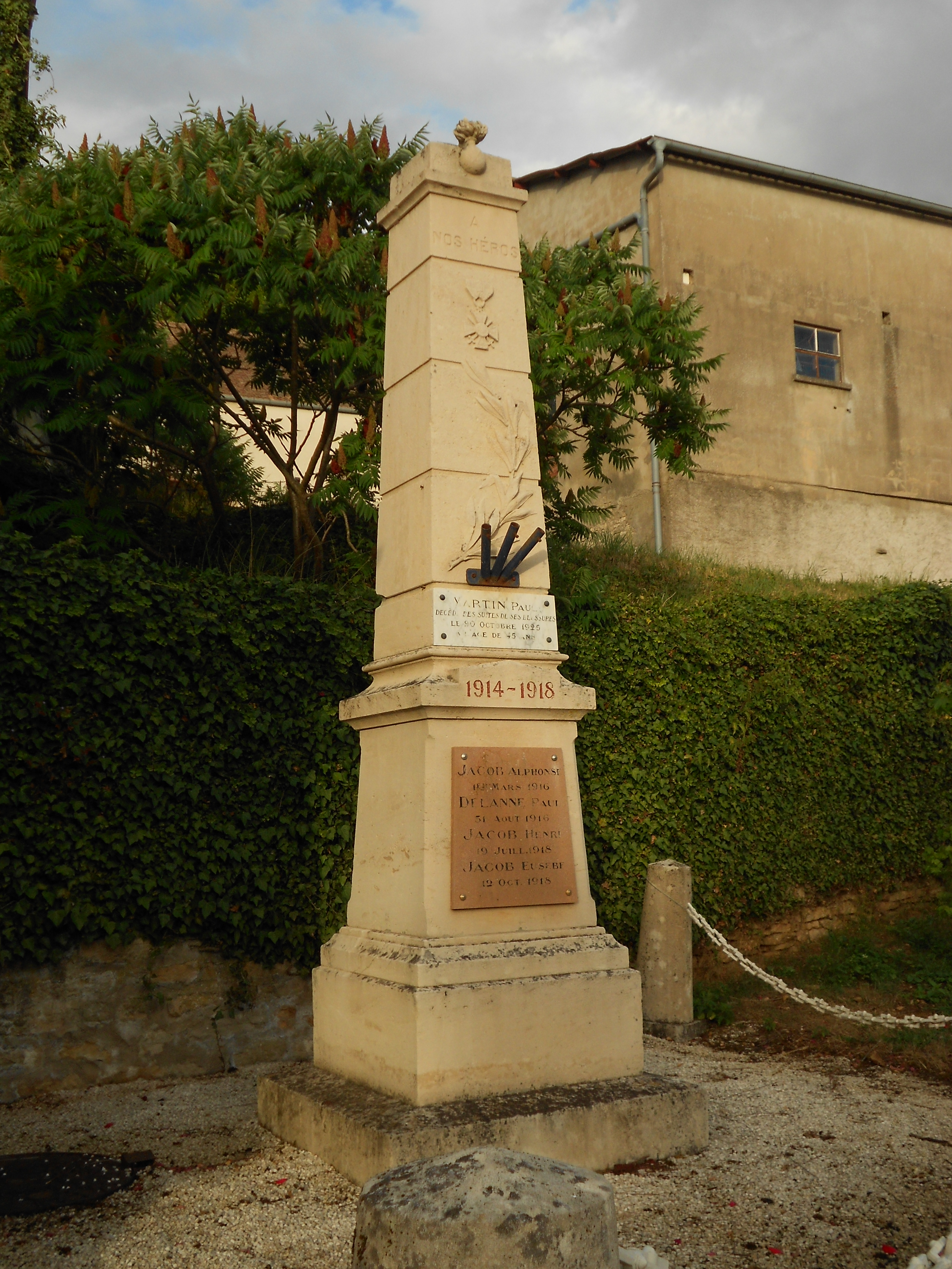 Monument aux mort Orcevaux